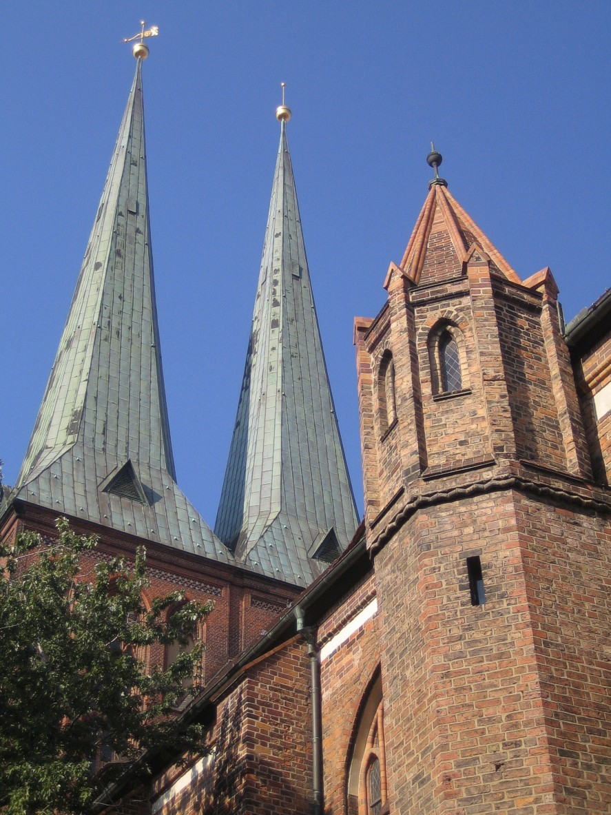 Bescheibung: Die Nikolaikirche, Teilansicht (Berlin-Mitte) Quelle: Eigenes Foto Datum: 2005 Fotograf: Manfred Brückels